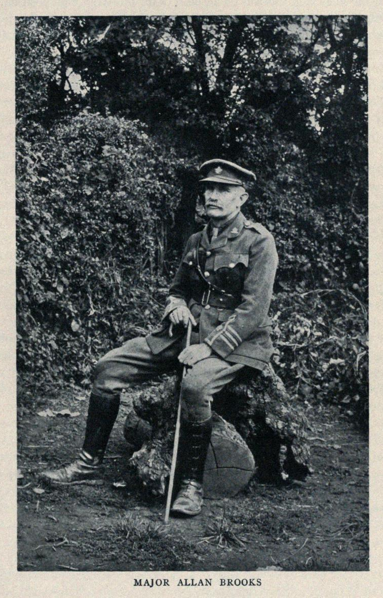 Major Allan Brooks